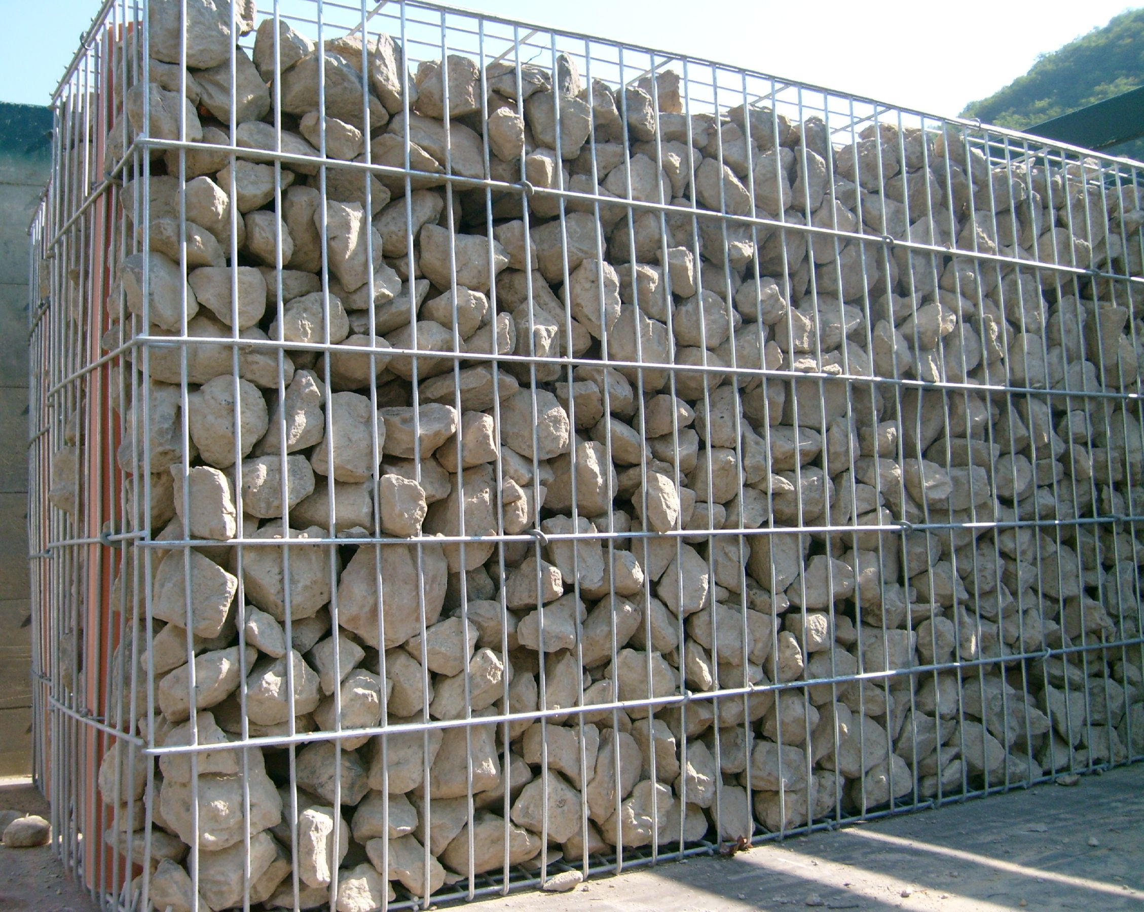 Eng Gabioun onsortéiert vollgeschëdd - 15. Mee 2008.